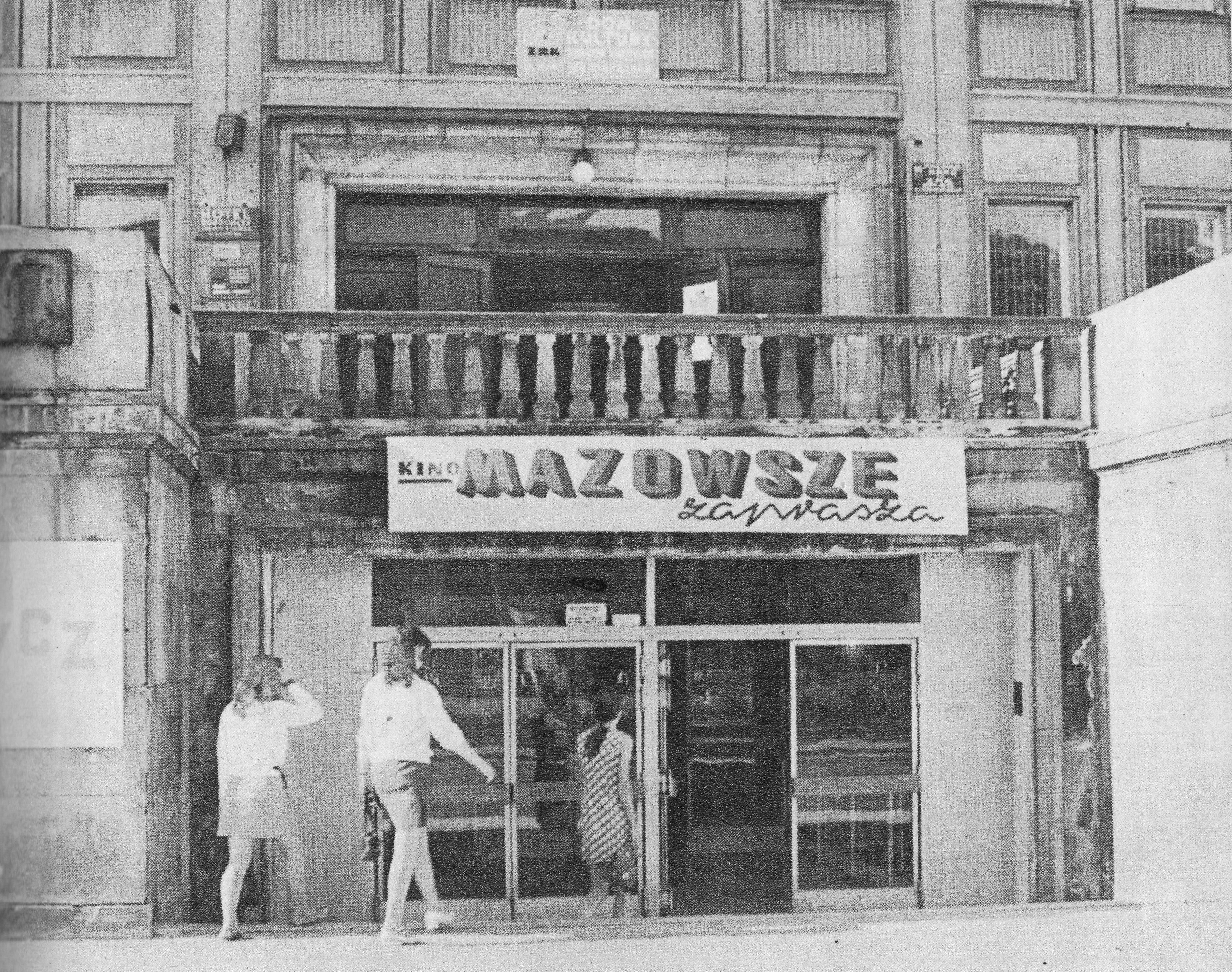 Wejście do kina "Mazowsze" przy ul. Marcina Kasprzaka 23 w Warszawie